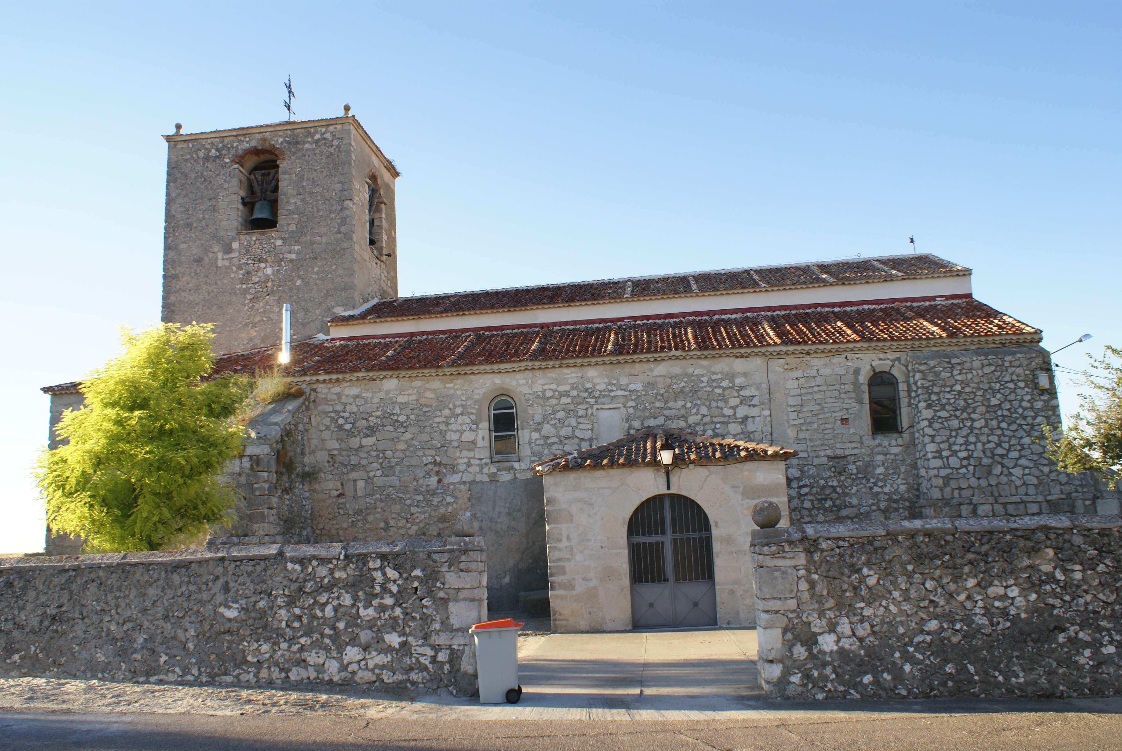 Iglesia de Bahabón, Valladolid.